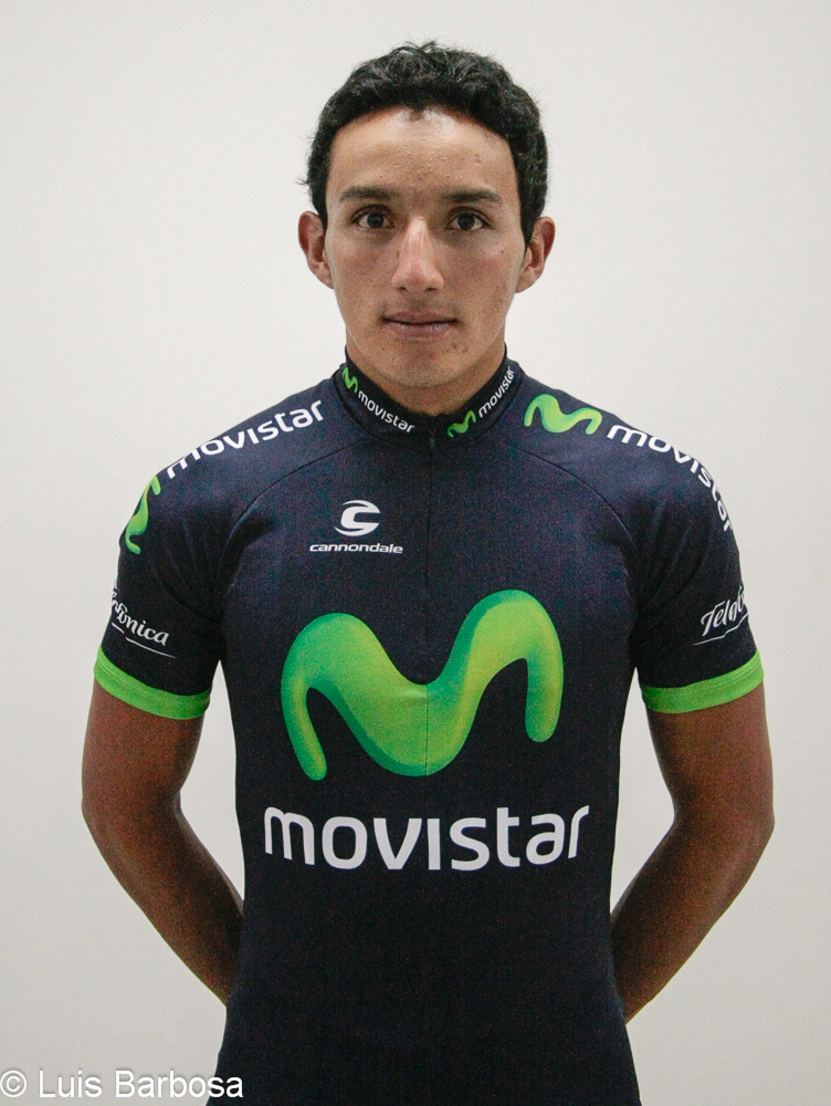 Photo officielle de Brayan Ramírez dans l'équipe Movistar Team America (saison 2013)